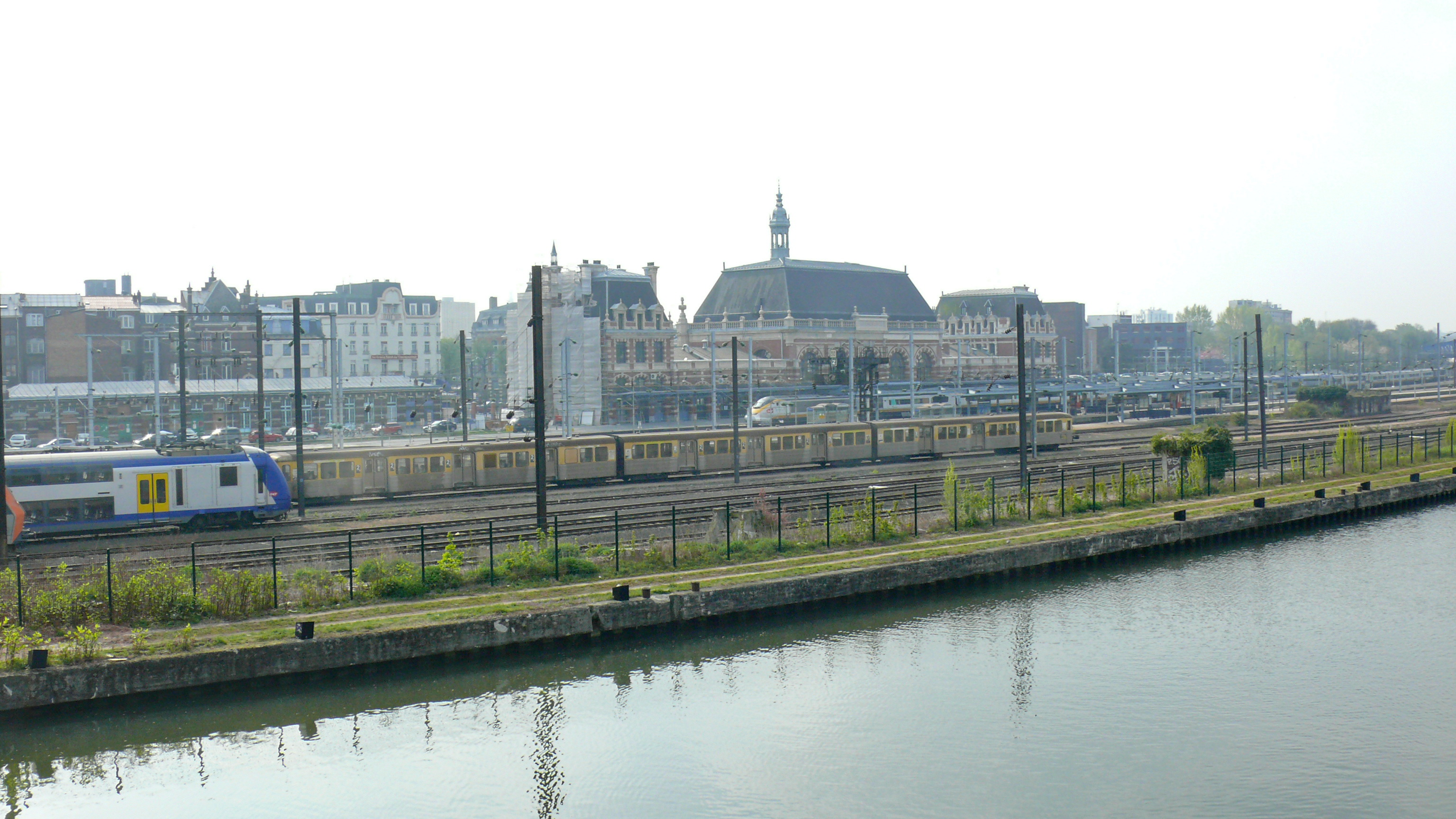 Valenciennes vue générale de la gare et de l'Escaut, vue du Pont Jacob